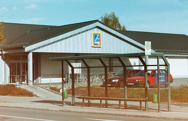 Filiale von Aldi Süd in Neusäß, Deutschland.